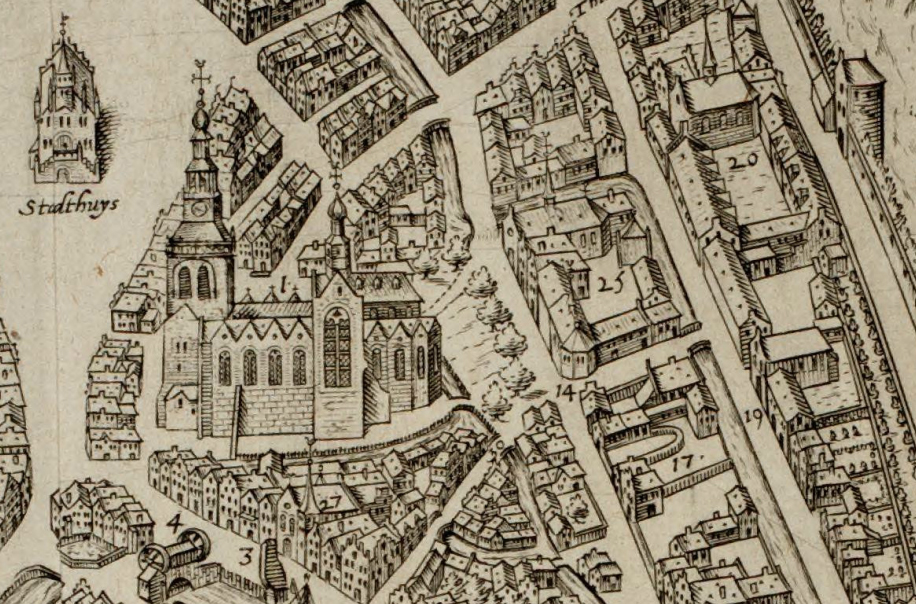 fragment van een kaart van Gouda uit de "Civitates Orbis Terrarum" door Braun & Hogenberg. Bij nr. 14 de Jeruzalemkapel, bij nr. 17 het Sint-Margrietklooster, bij nr. 19 het Cellebroedersklooster, bij nr. 20 het Sint-Catharinaklooster en bij nr. 25 het Collatiehuis